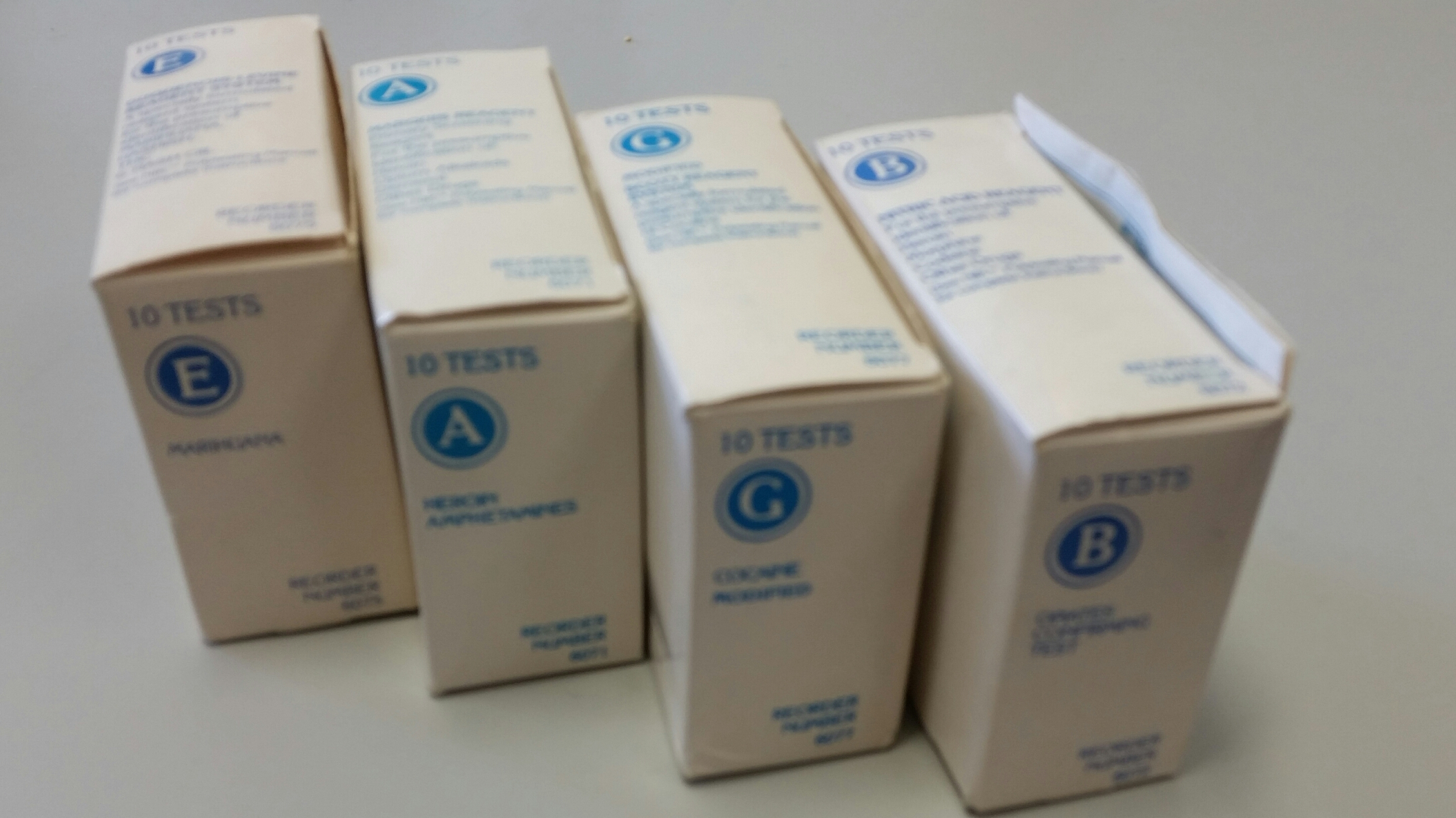 Διάφορα τεστ για ανακάλυψη ναρκωτικών ουσιών